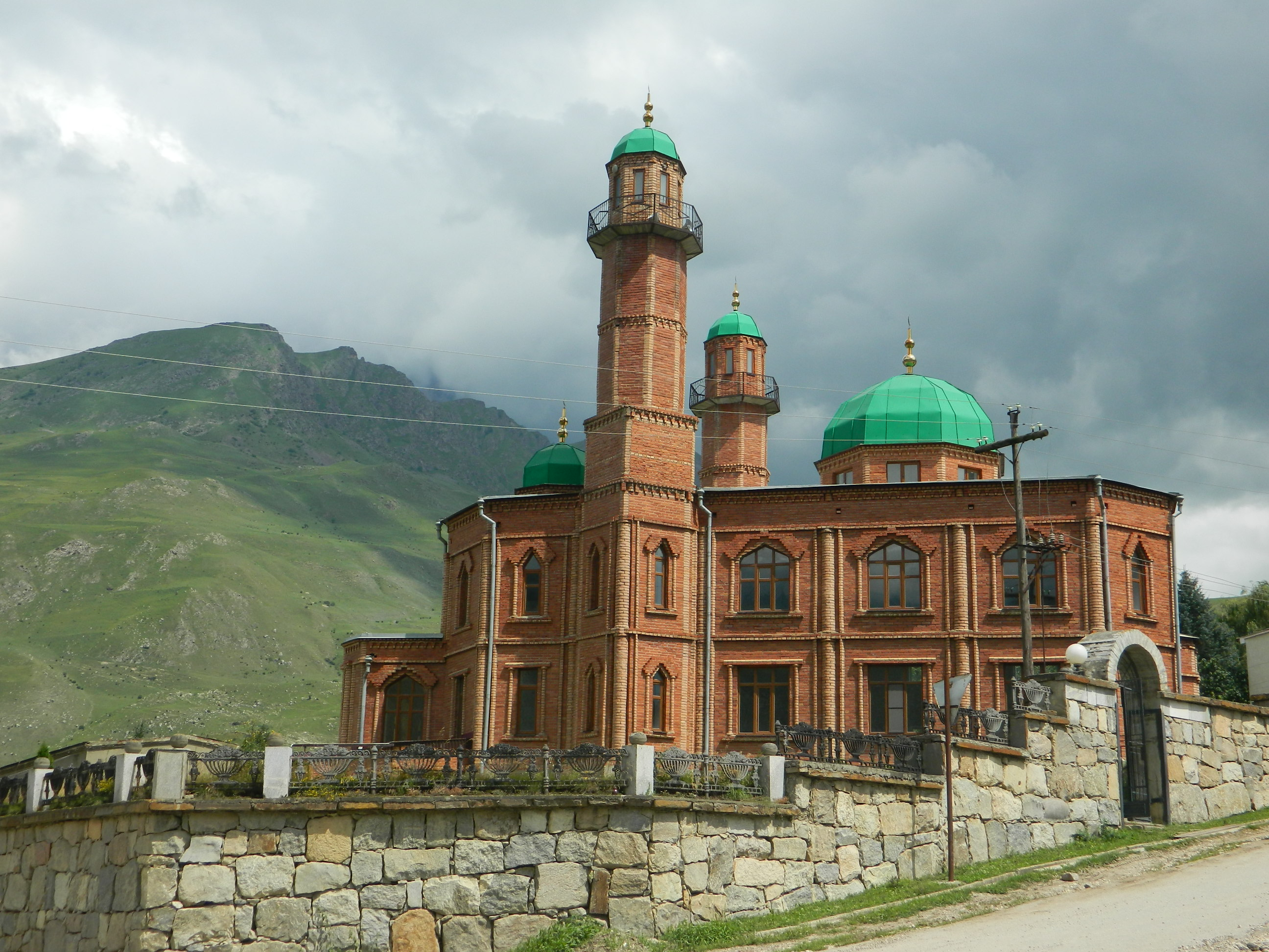 Мечеть в поселке Верхняя Балкария